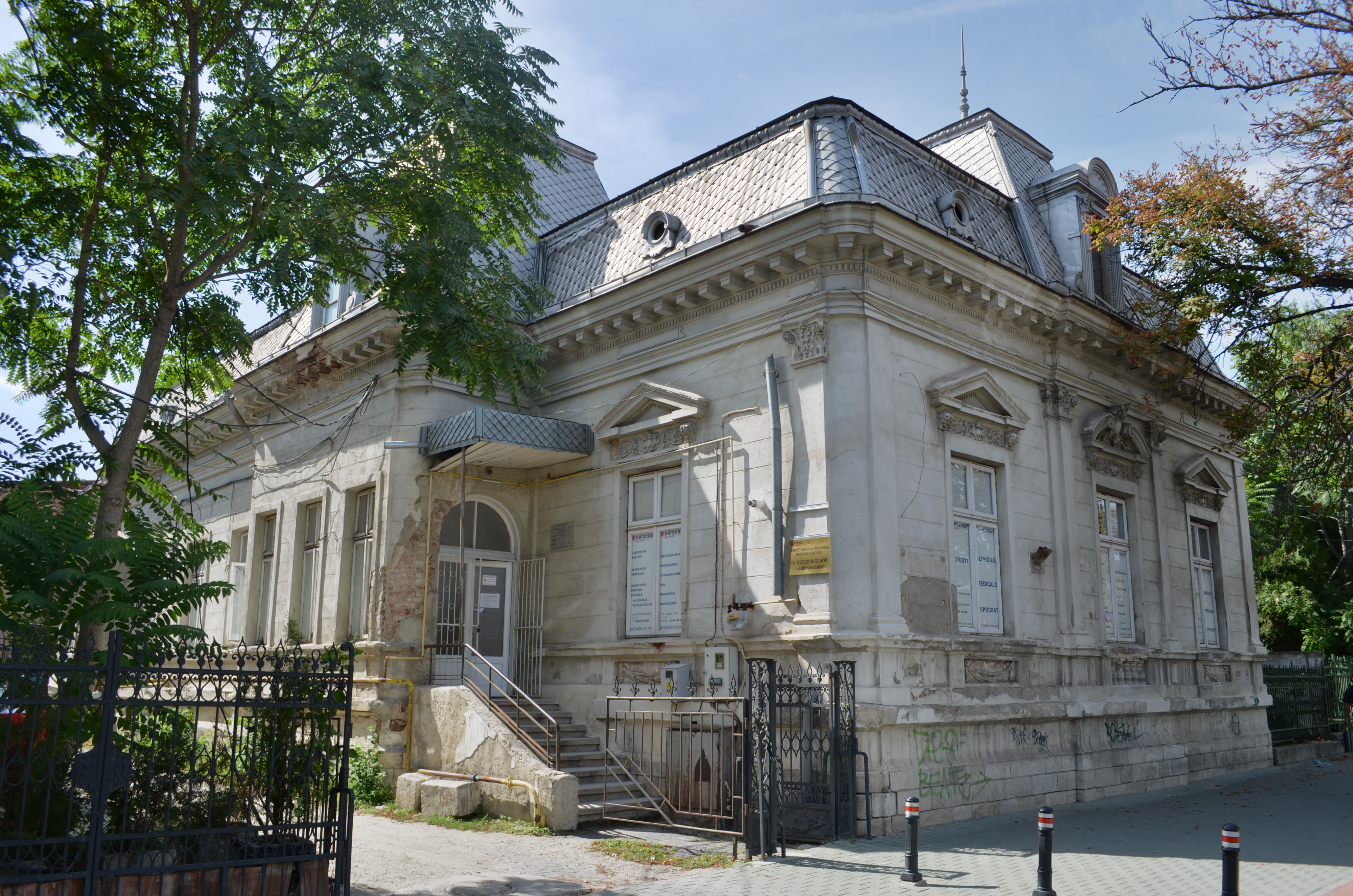 Casa Alexandru Radovici, azi Clinica Medicală HIPOCRAT 2000, Bd. Independenței nr. 14, Ploiești